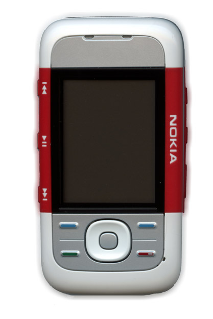 Nokia 5300 Handset - Slide closed